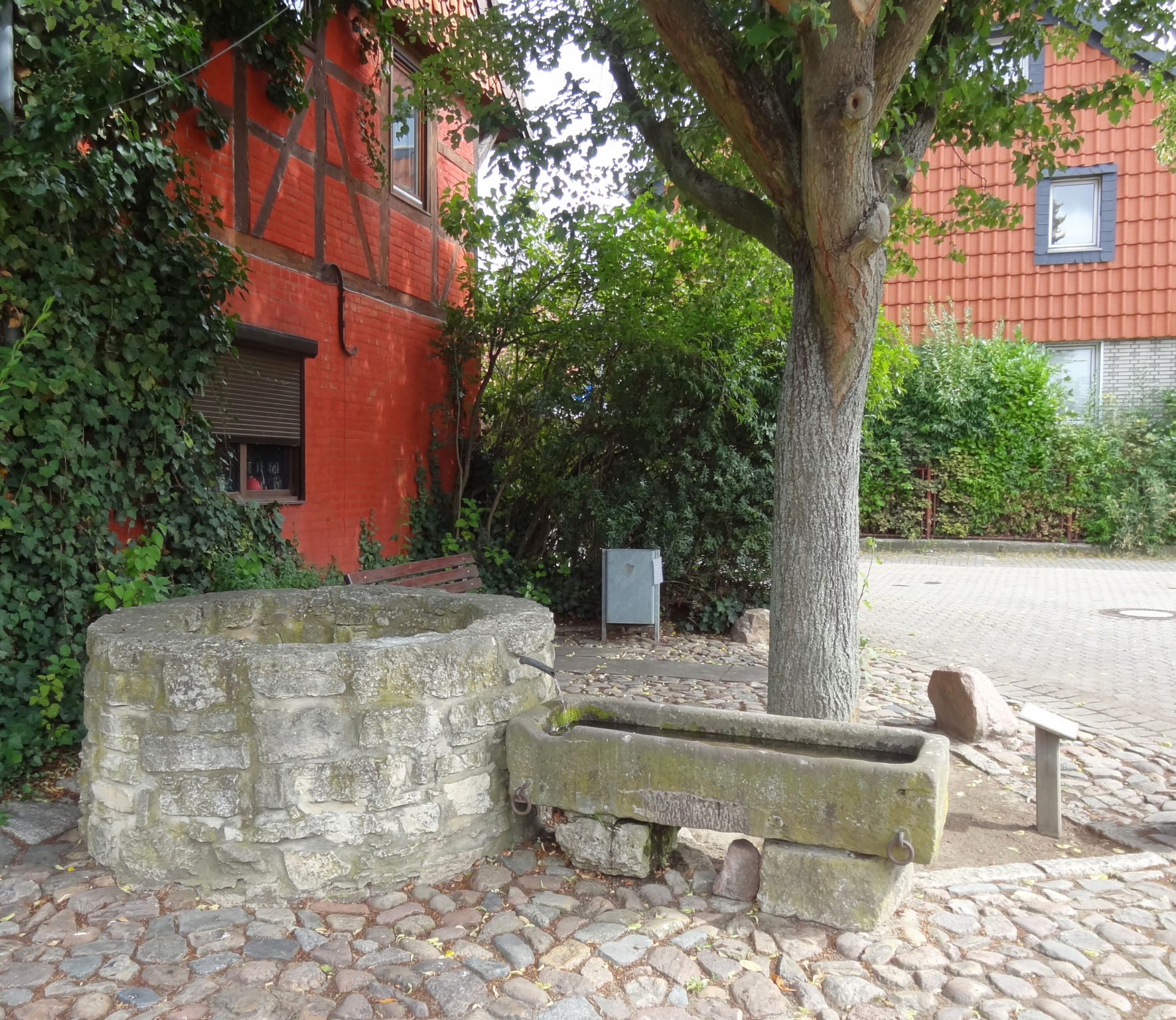 Der ehemalige Dorfbrunnen von Mascherode dient seit 1995 als Zierbrunnen.